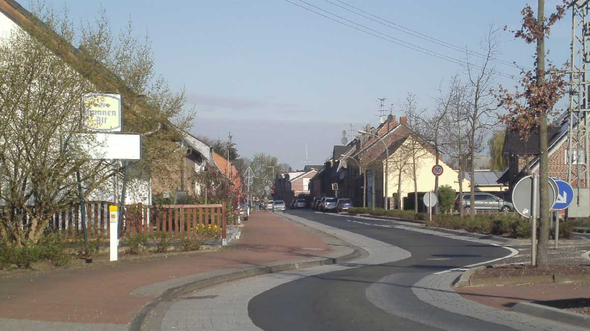 Ansicht von Vennheide aus Richtung Südosten (Kreisstraße 17 aus Richtung Neersen) in Willich-Anrath, Kreis Viersen, Nordrhein-Westfalen.